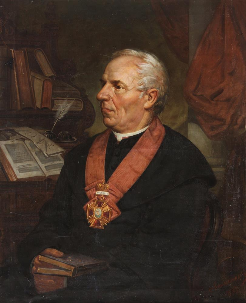 Анто́ній Степа́нович Петруше́вич (псевдоніми: Антоній из Добрян, Галичаненько А., Галичанин, Подкова Иван, Русин Галичанин, Русолюбович А., Тотсамович А. та ін.; 18 січня 1821, с. Добряни — 23 вересня 1913, Львів) — український історик, мовознавець, дослідник історії Галичини, священник Греко-католицької церкви (нині — УГКЦ), належав до москвофільского напрямку. Стрийко д-ра Евгена Петрушевича — українського громадсько-політичного діяча, правника, Президента й Уповноваженого Диктатора Західноукраїнської Народної Республіки (ЗУНР). Двоюрідний дід Корнила Сеника.